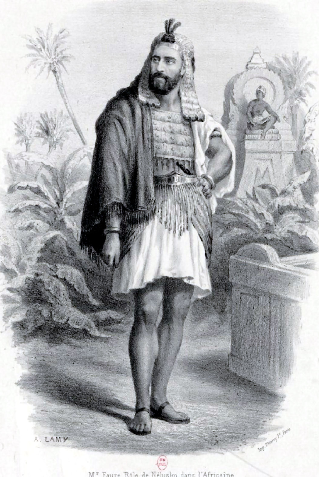 Jean-Baptiste Faure dans le rôle de Nélusko de L'Africaine de Meyerbeer